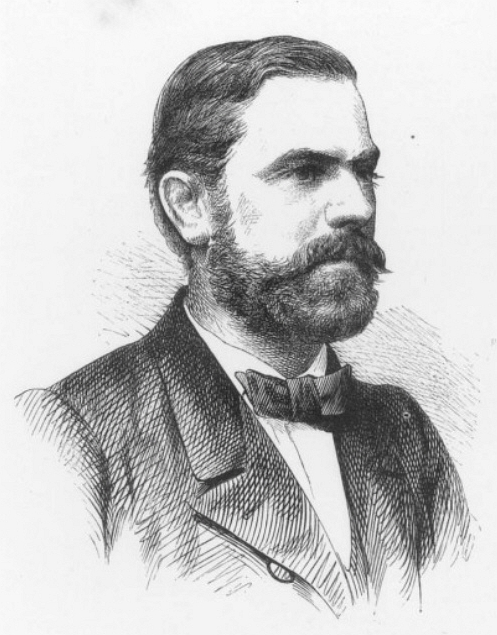 Ernst Giese (* 16. April 1832; † 12. Oktober 1903), deutscher Architekt. Presseholzschnitt aus einer Zeitung vom 22. Juli 1865